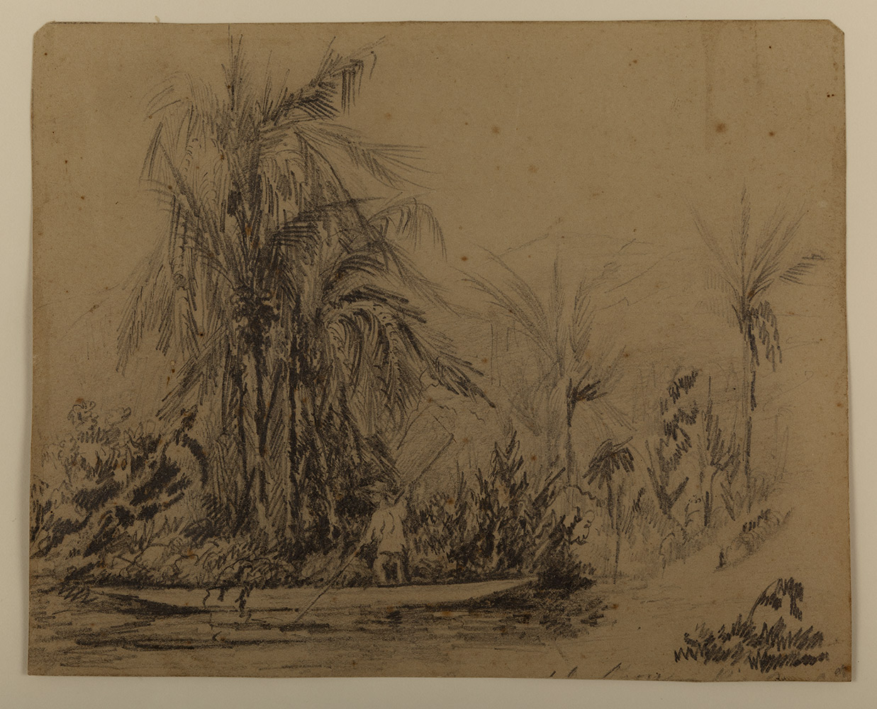 Brazo del río Opón (Provincia de Soto)